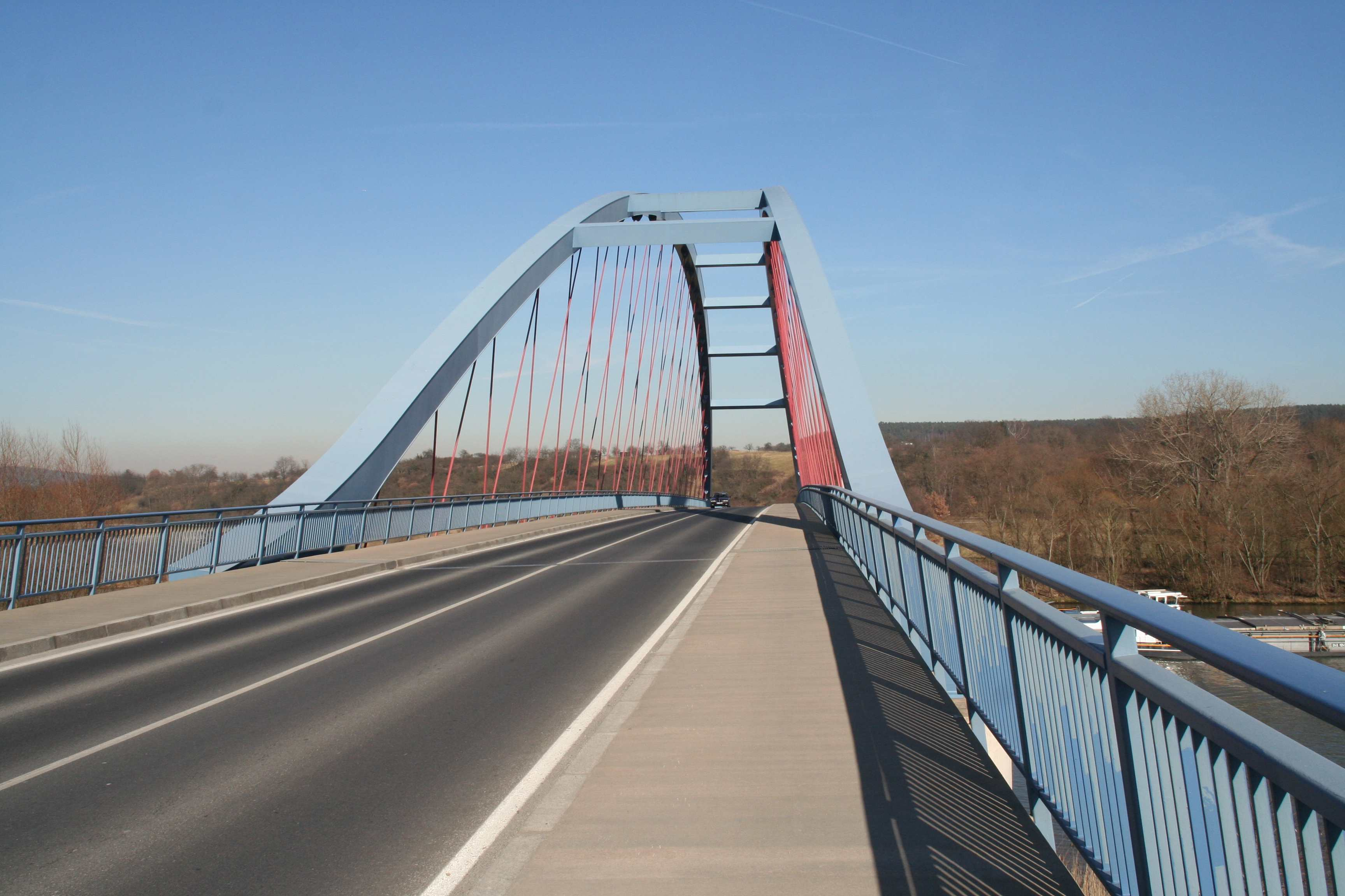 Neue Mainbrücke Niedernberg-Sulzbach, Kreis Miltenberg, in Unterfranken